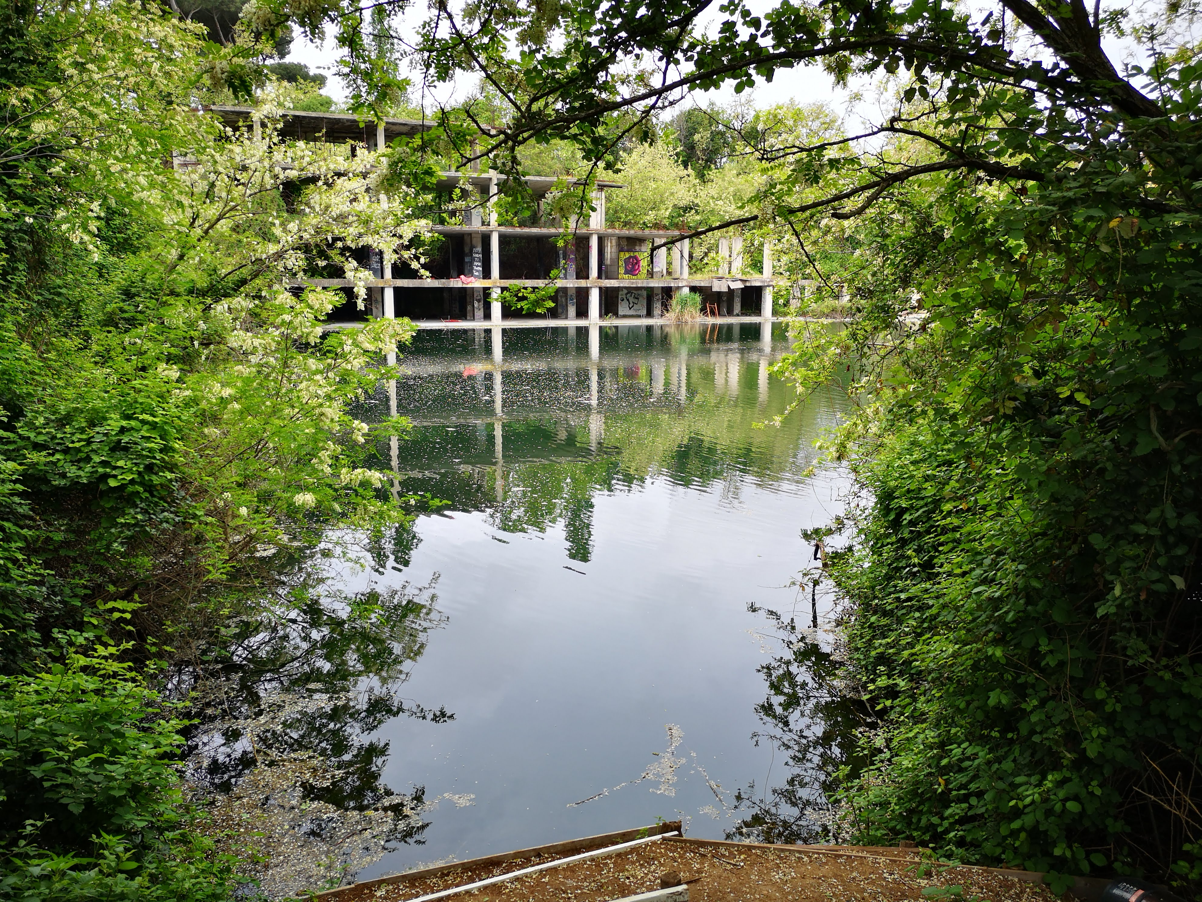 Lago ex Snia - Roma Parco delle Energie